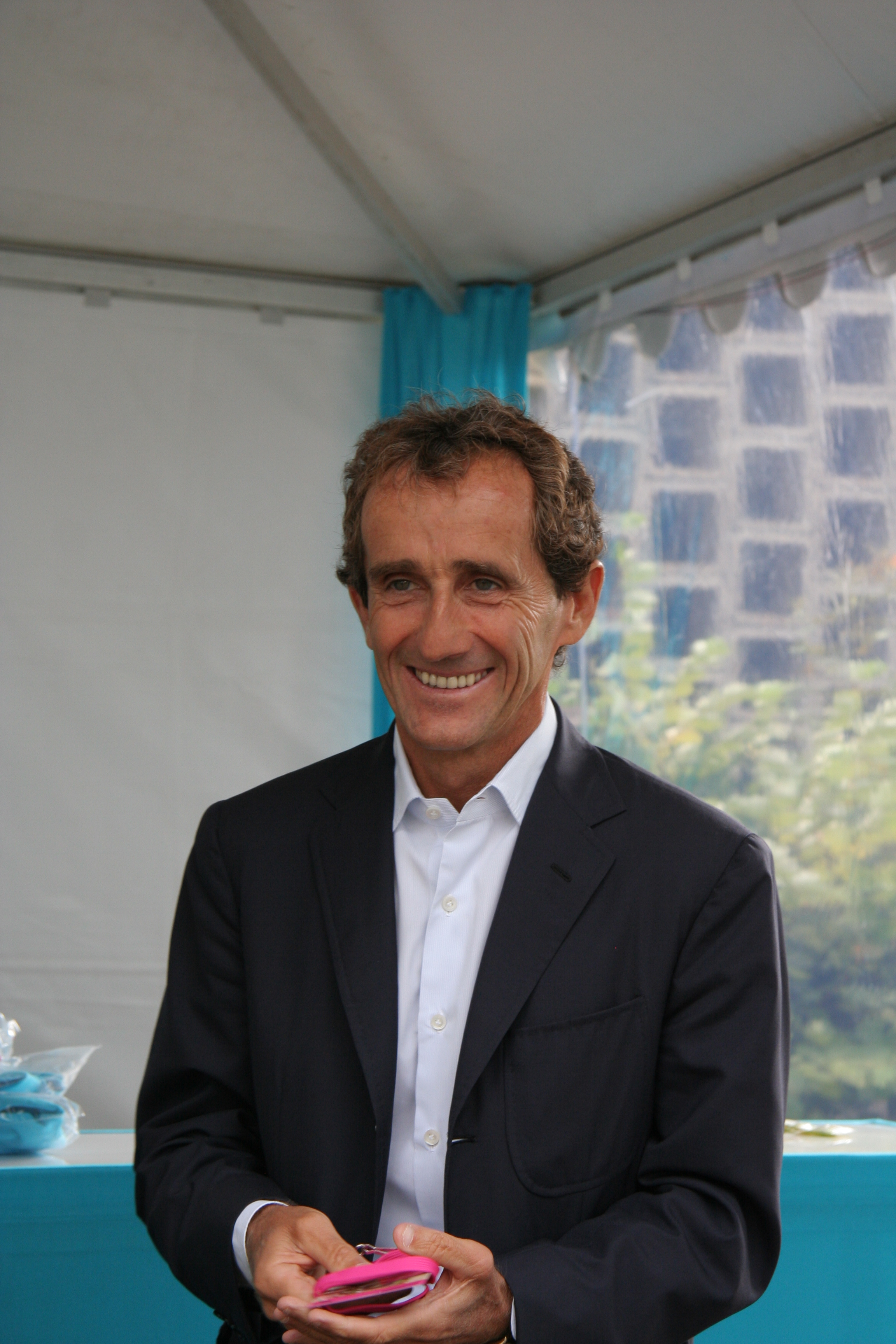 Alain Prost